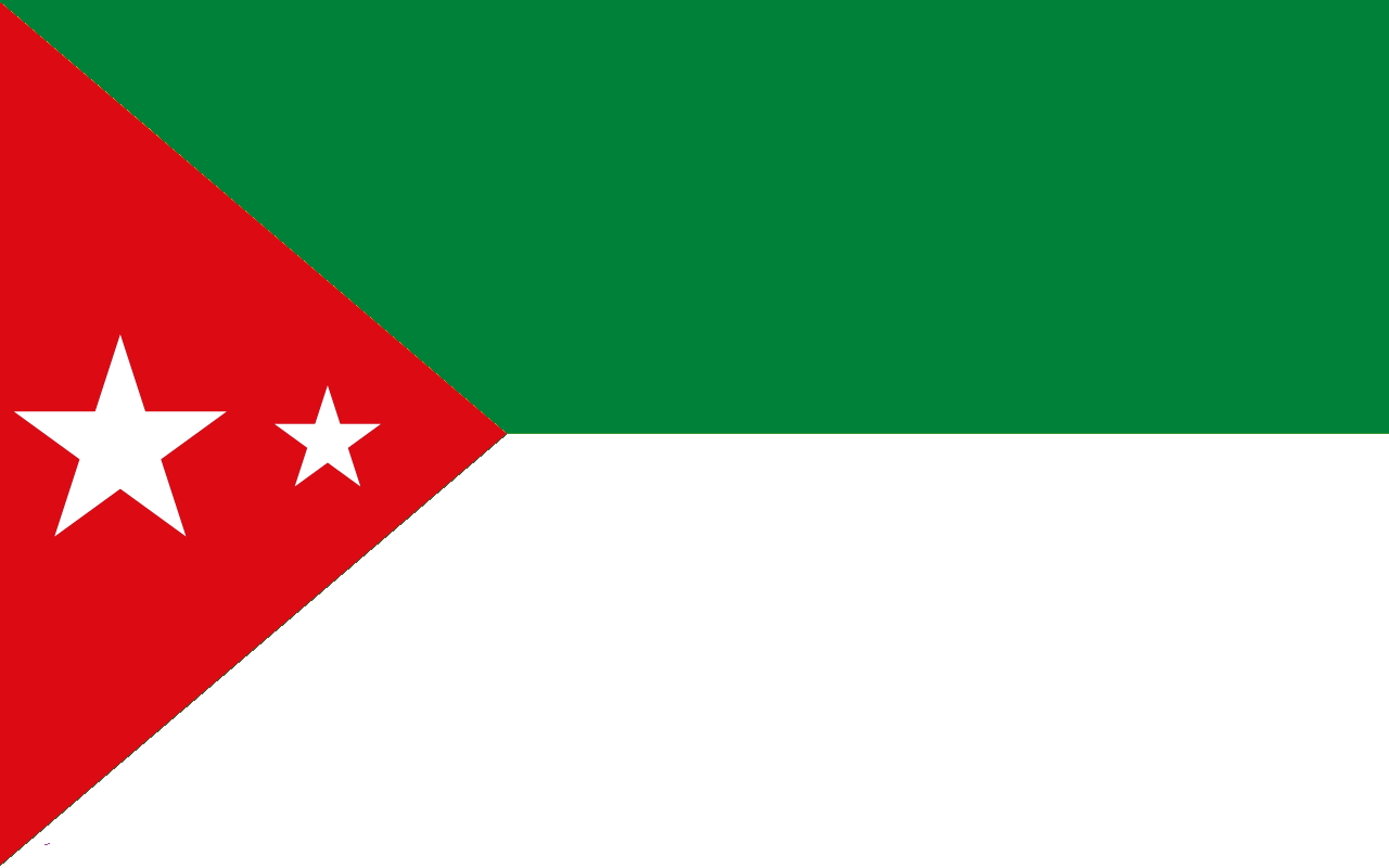 Bandera de San Pedro de Huaca